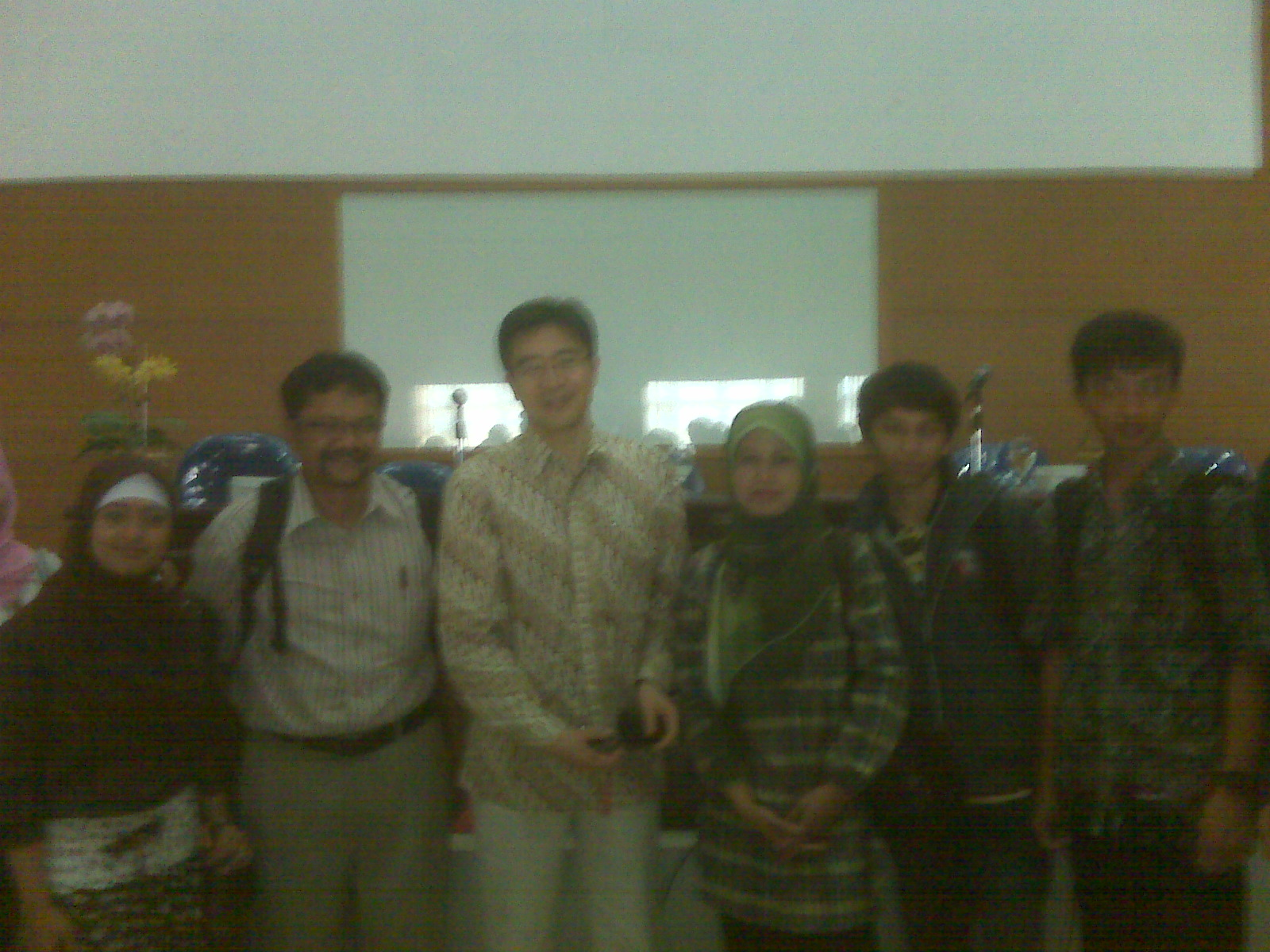 Prof. Dr. Mikihiro Moriyama, katilu ti kenca